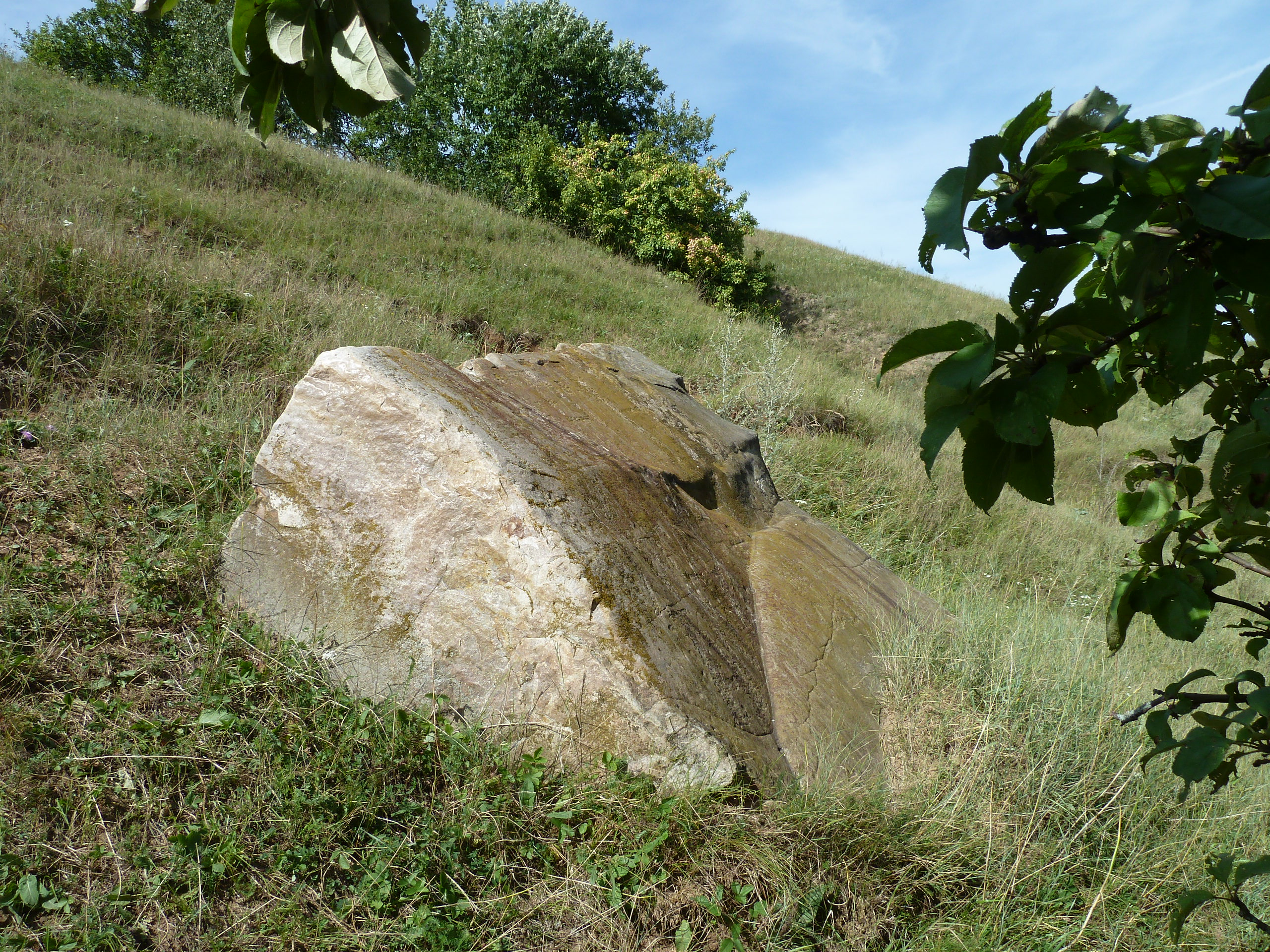 Священный камень (Синь-камень) на берегу Зуши близ деревень Мужиково и Горенки